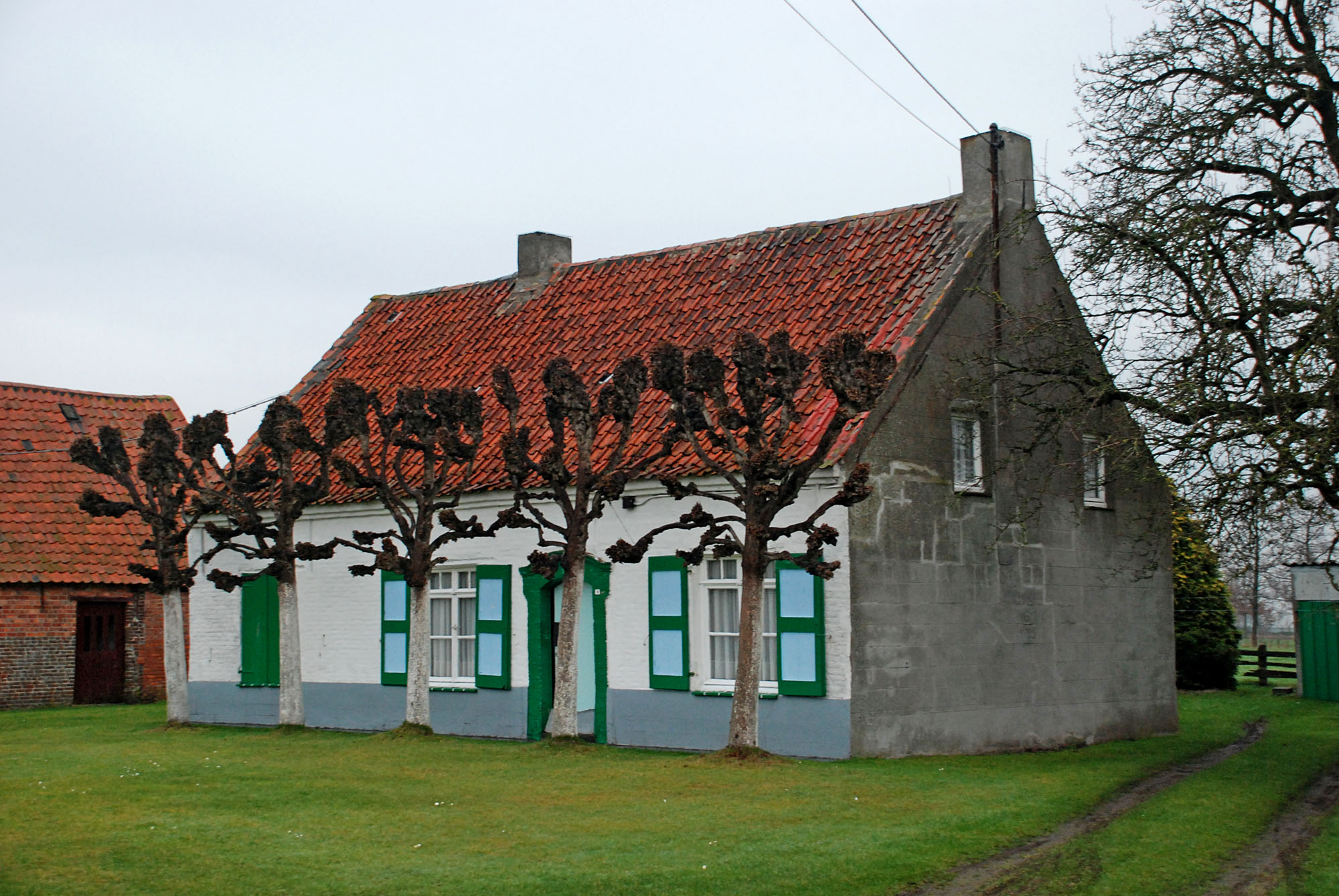 Oosteeklo onroerend erfgoed ID 76371